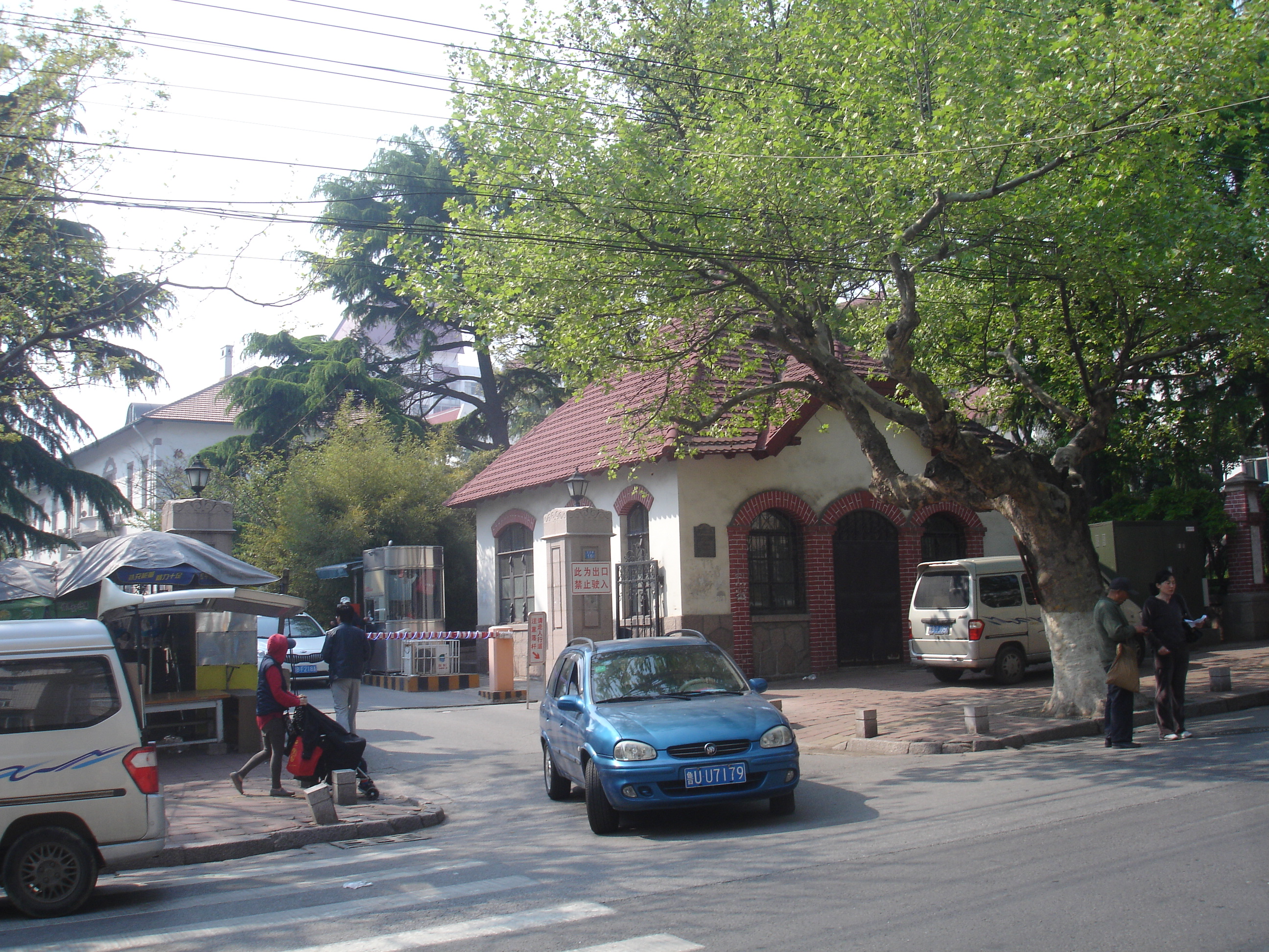 青医附院东门